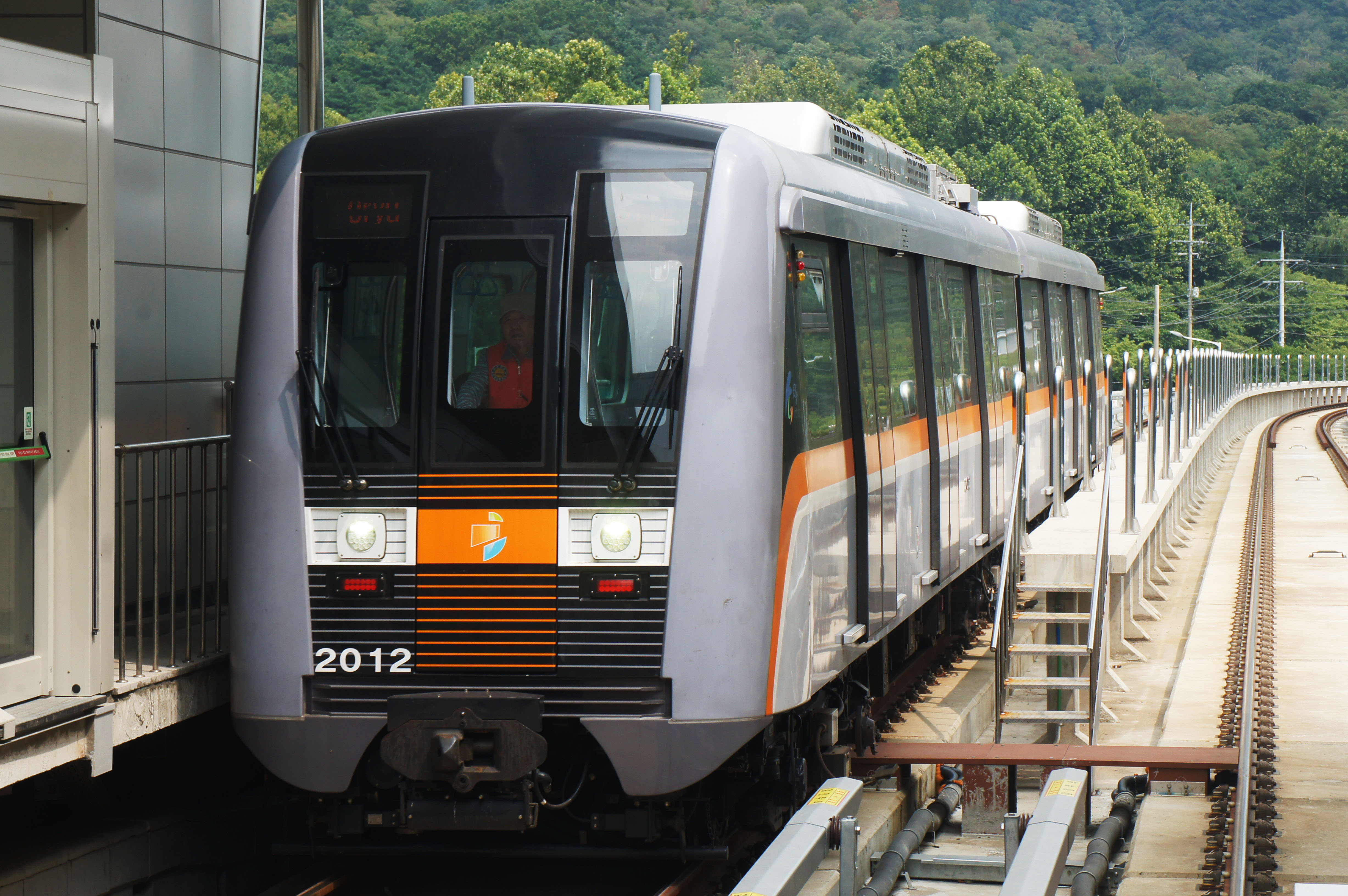 인천교통공사 2000호대 전동차 212편성이 인천대공원역에 진입하고 있다.